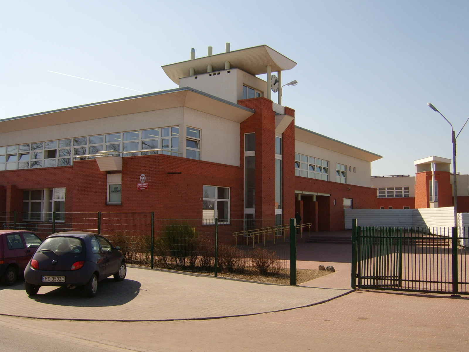 Gimnazjum nr 2 im. Jana Pawła II (Autor: Cruizer)